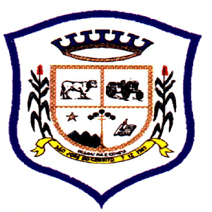 Brasão do Município de São José do Cerrito - SC, Brasil